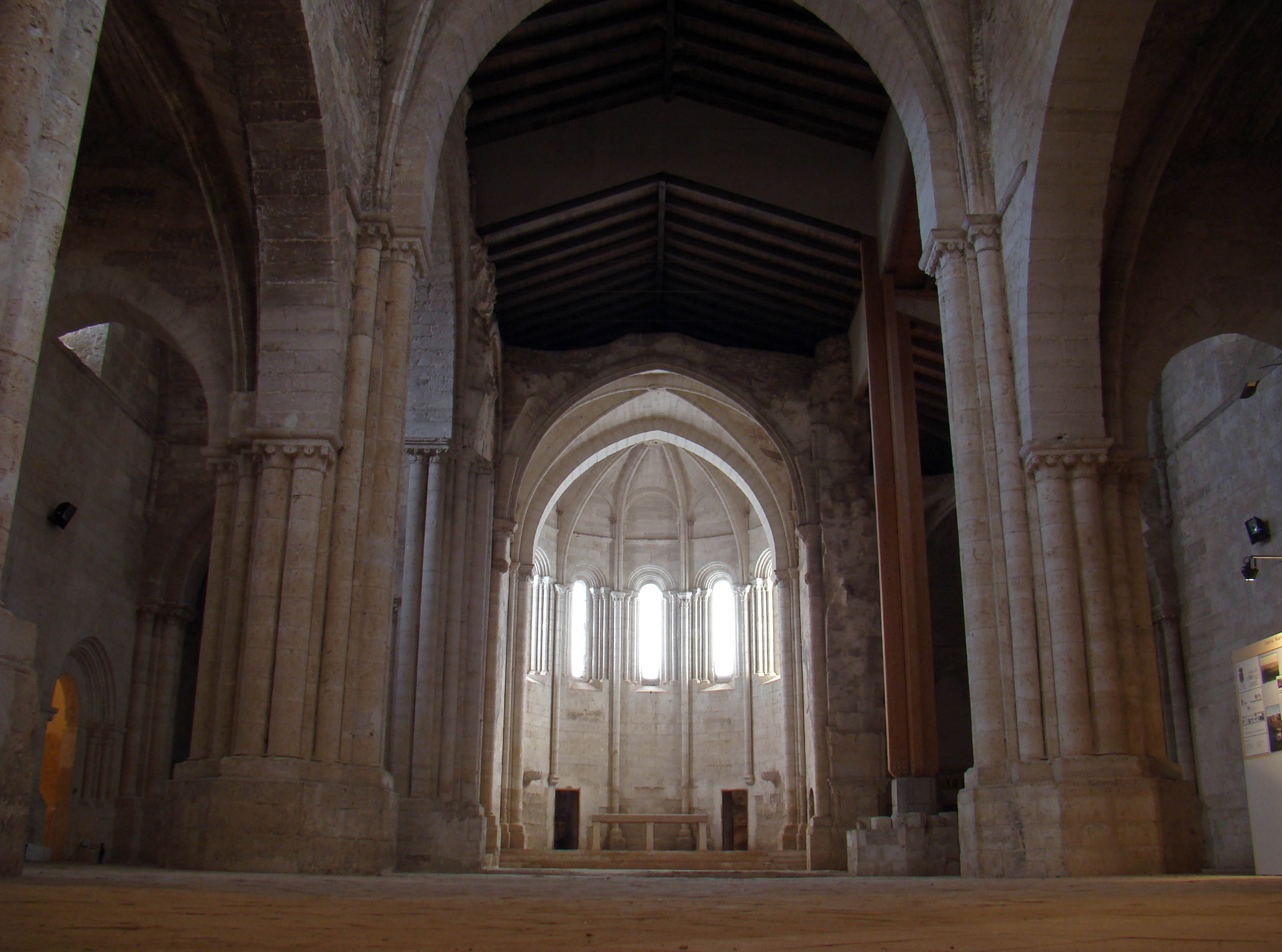 Monasterio de Palazuelos en la provincia de Valladolid. Interior de la iglesia. Vista del presbiterio desde el crucero.